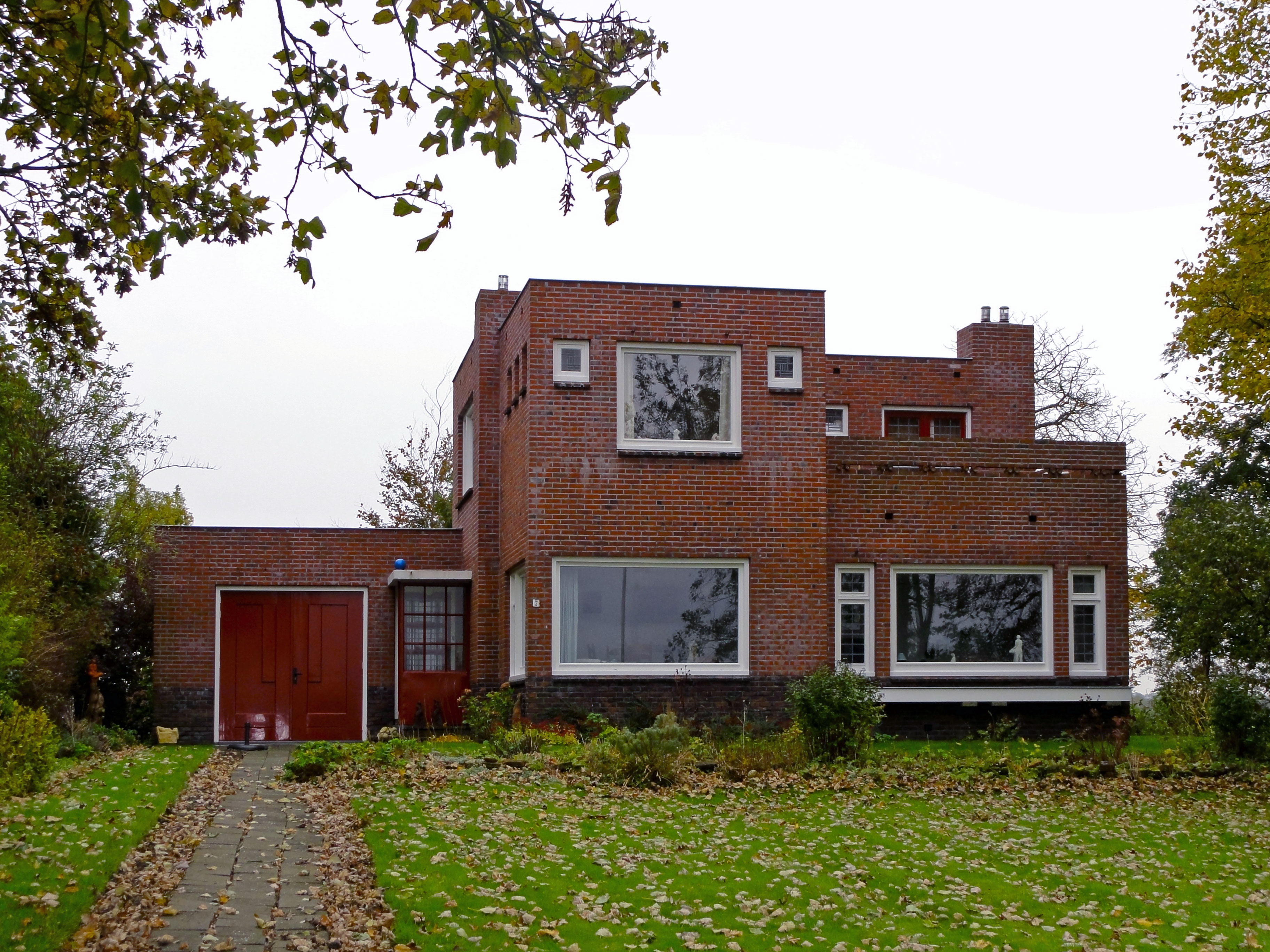 Pastorie en consistorie Nederlands Hervormde kerk te Niekerk (de Marne)